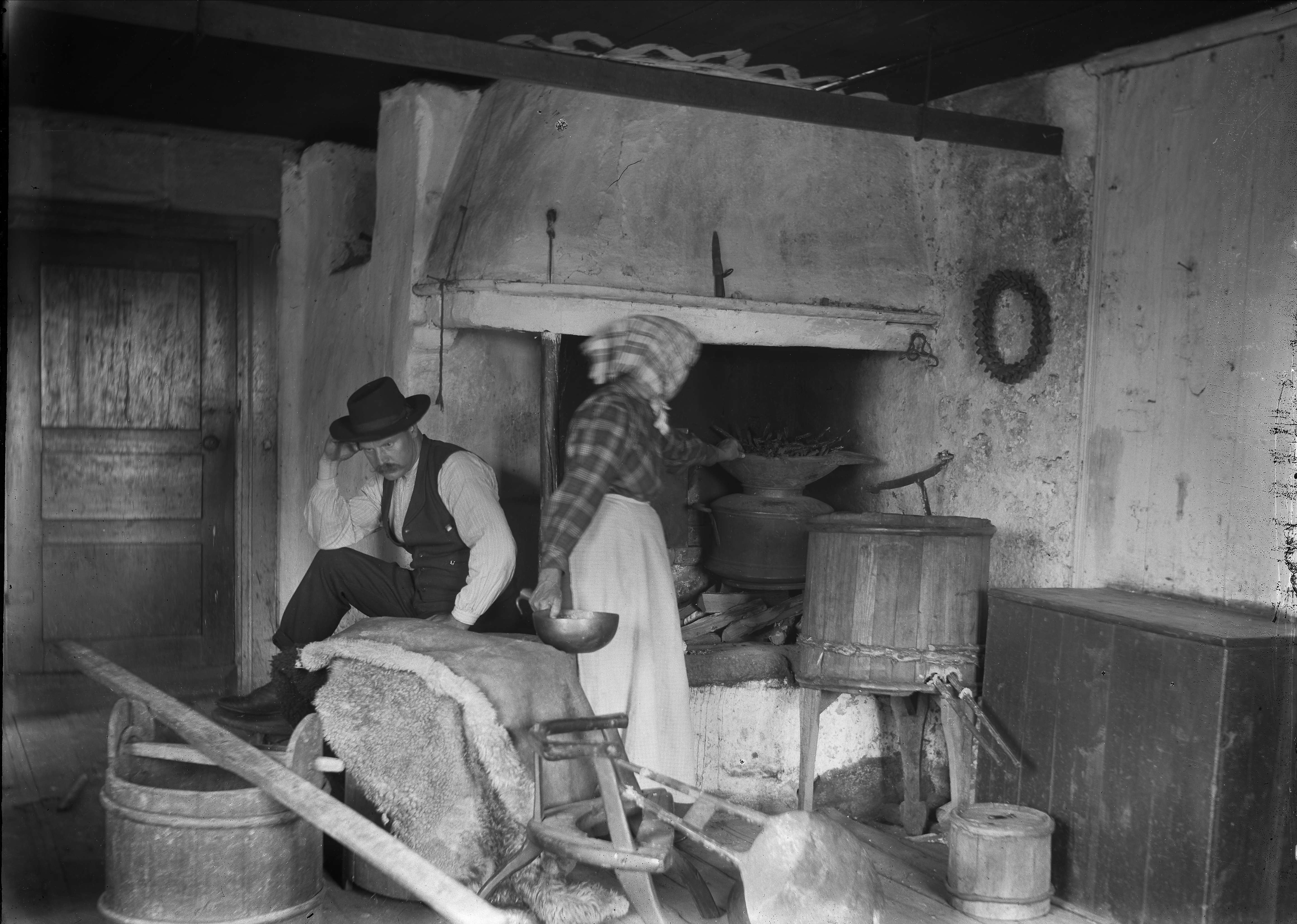 Brännvinsbränning. "Dranken silas före destillationen i brännvinspannan genom den med halm fyllda, stora trätratten."